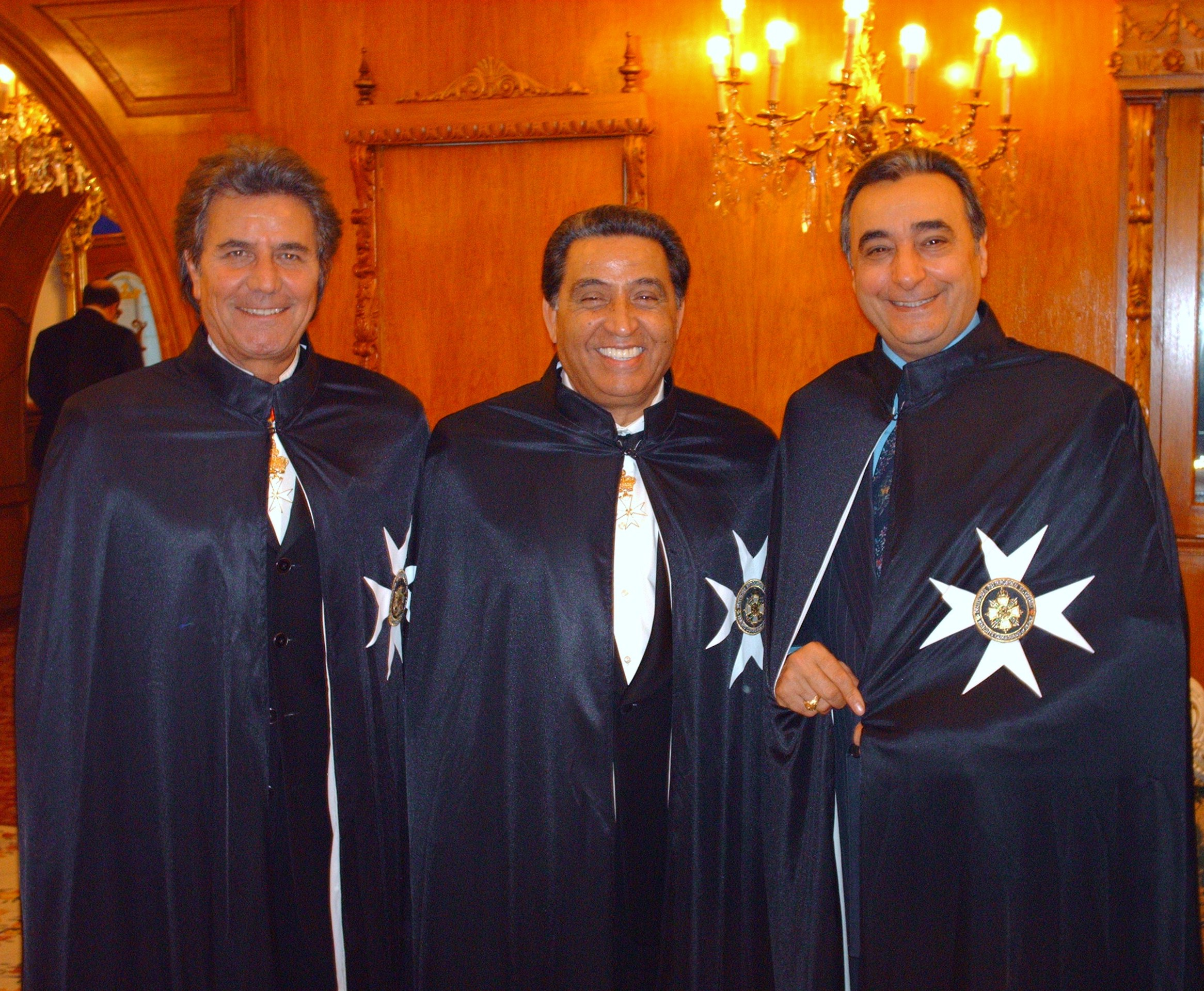 Sono l'autore e il proprietario della foto. Antonello Rondi, Mario Trevi e Bruno Venturini ritratti il 26 novembre 2005 alla loro nomina di Cavaliere dell'Ordine di Malta